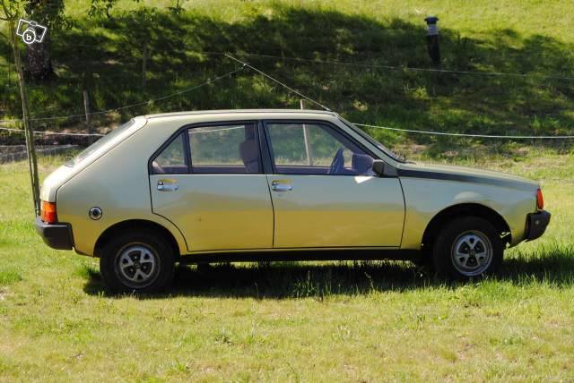 Renault 14 TS Phase 2